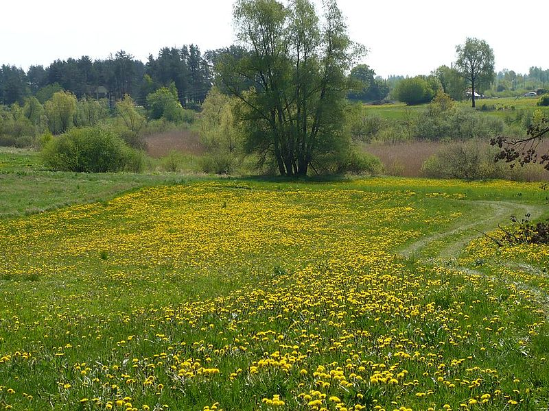 Doles sala. 2008. gada 11. maijs